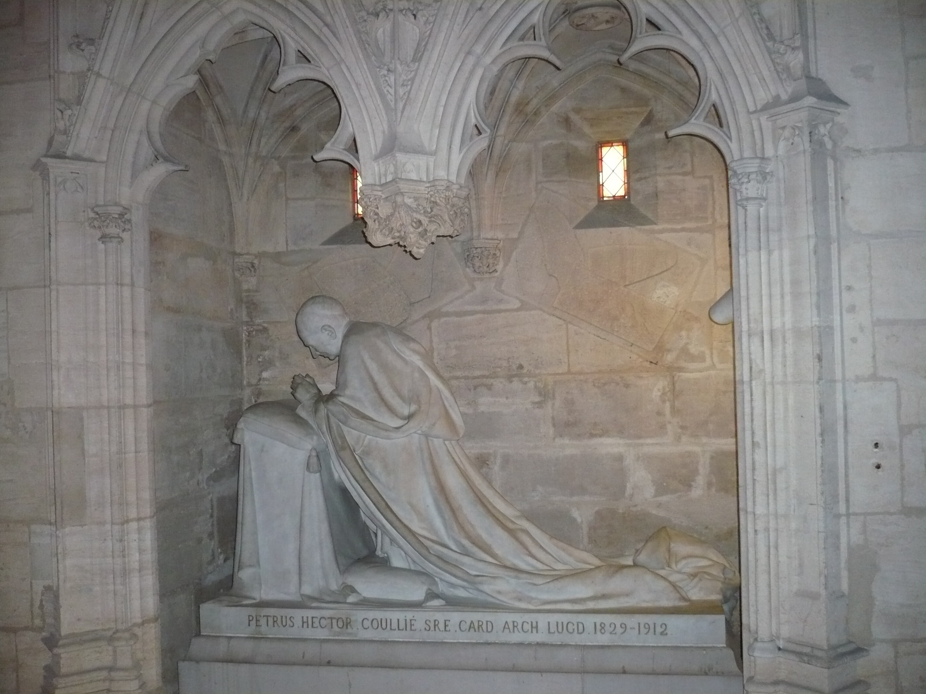 Cénotaphe de Pierre-Hector Coullié